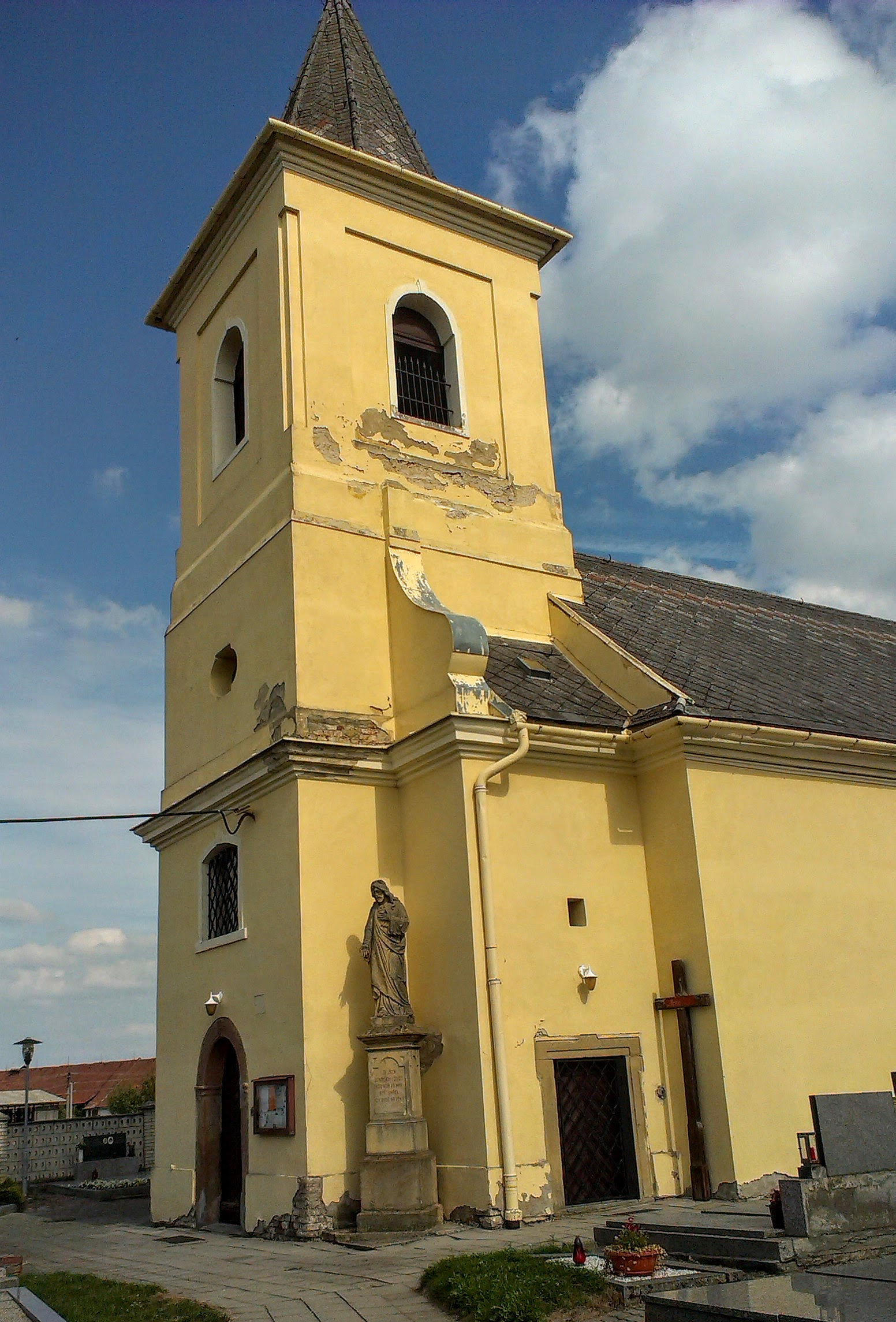 Kostel Navštívení Panny Marie, Cetechovice.